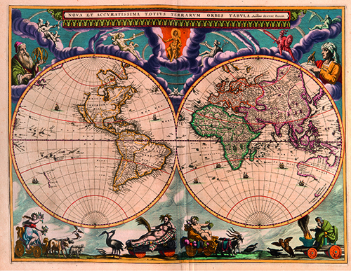 Joannes Blaeu, Atlas Maor (vol. 1), sive cosmographia blaviana, qua solum, salum, coelom, accuratissime describuntur. Geographia, quae est cosmographia Blaviana pars prima, 1662, papier.